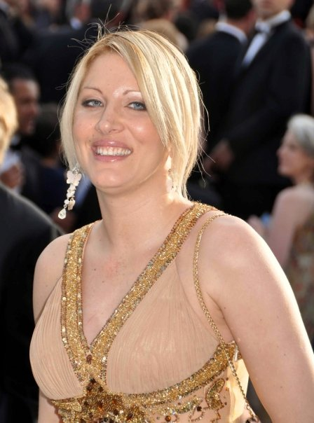 Loana au festival de Cannes